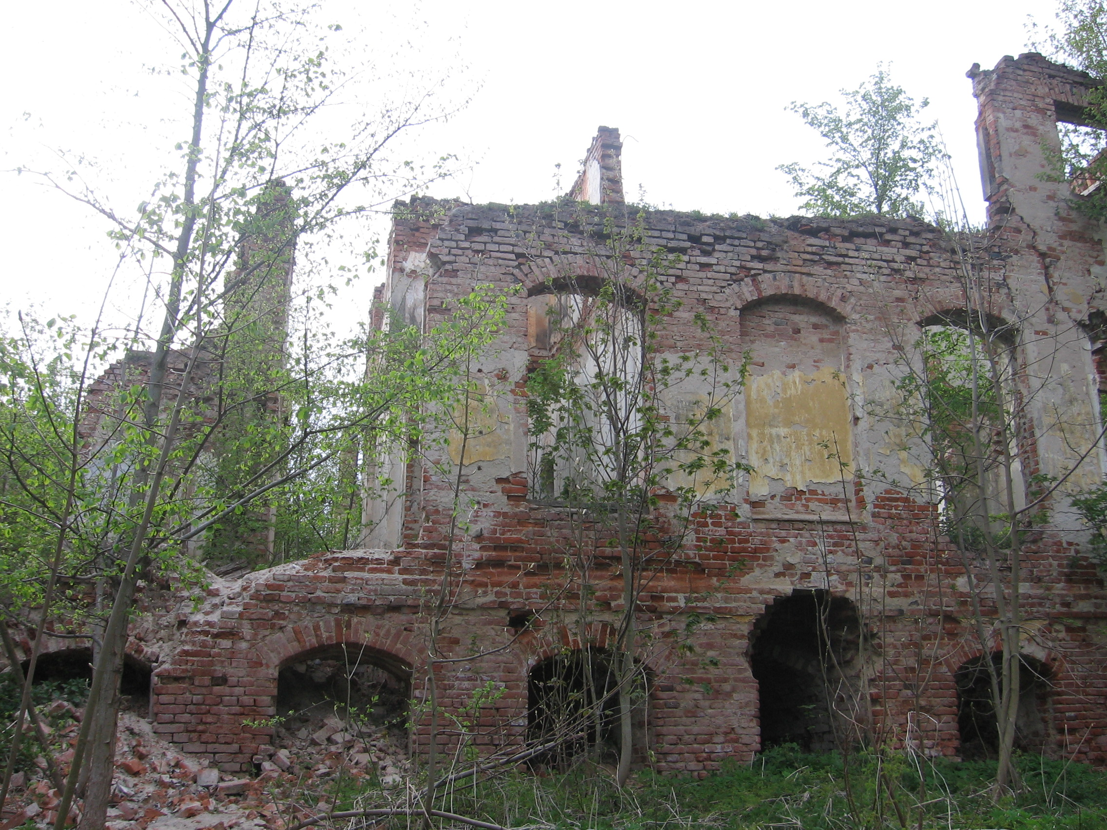 ARKLITY - RUINY PAŁACU RODU EGLOFFSTEIN